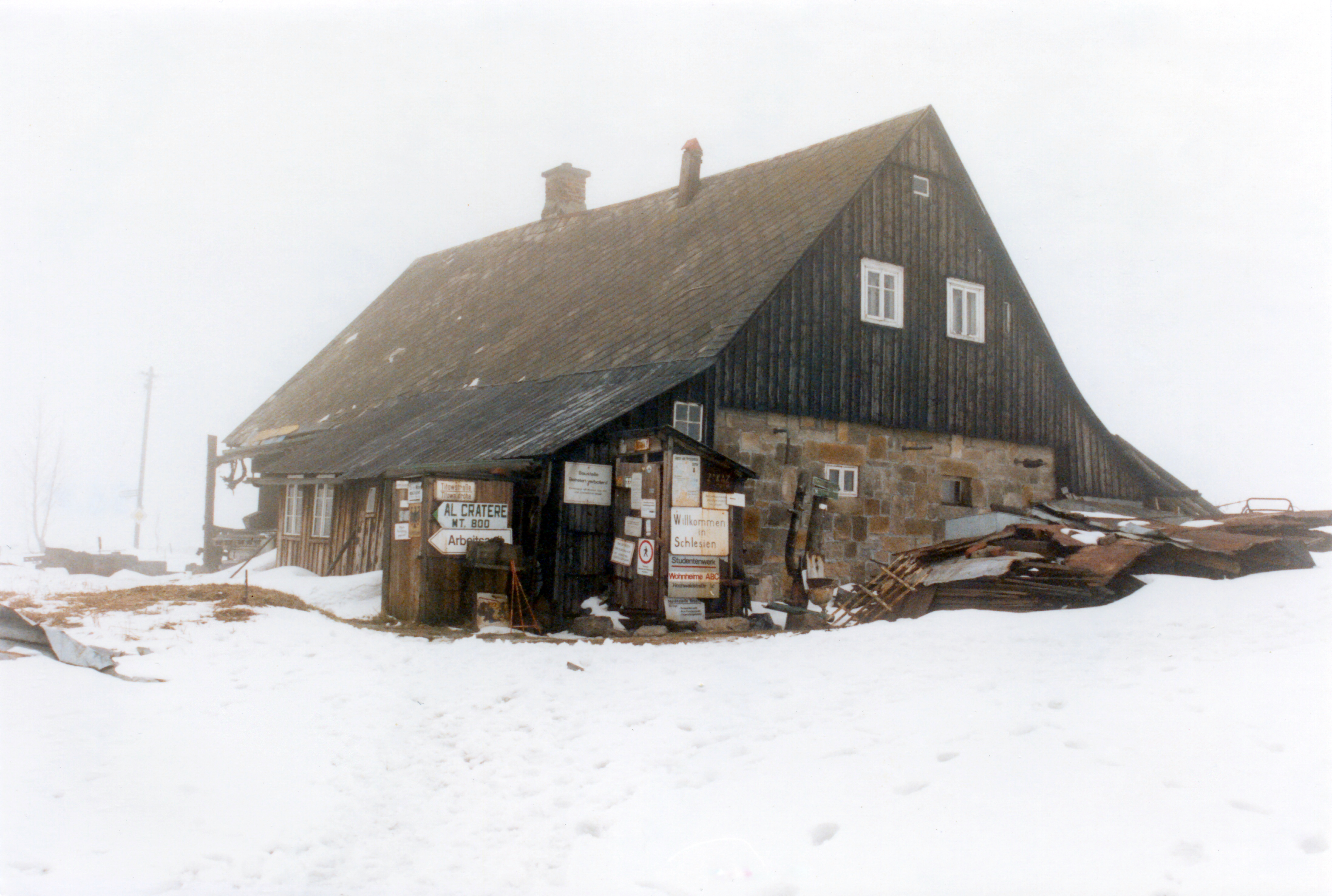 Das Misthaus von Gustav Ginzel, Rückseite